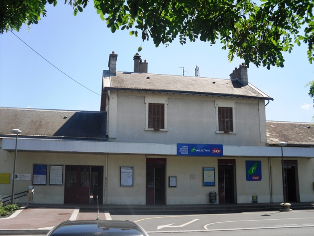 La gare de Sainte-Geneviève-des-Bois (Essonne, Île-de-France, France).